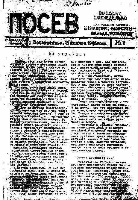 Posev - Frontpage